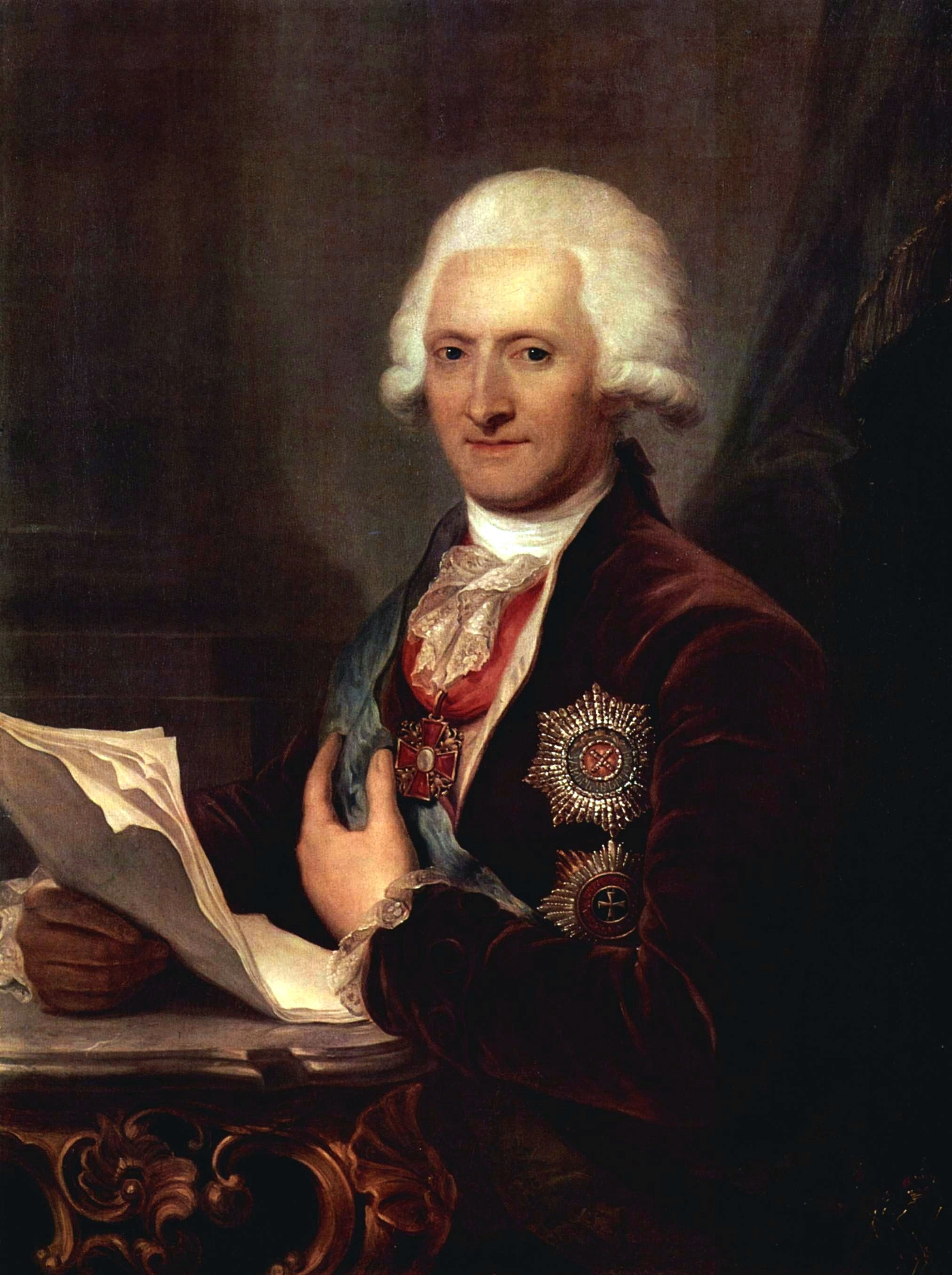 Jacob Sievers (circa 1757-1838)